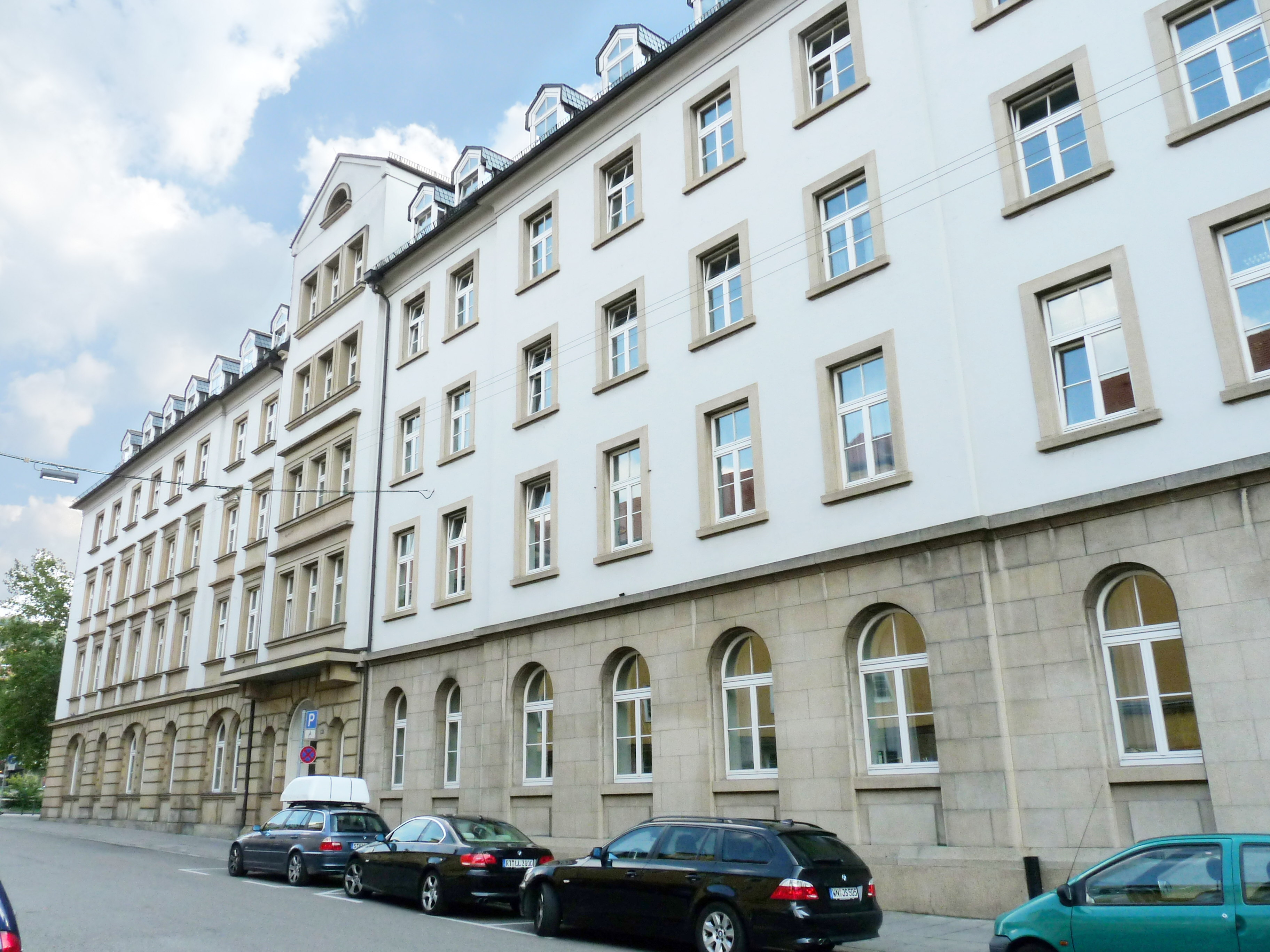 Stuttgart - Hotel Silber - Ehemalige Gestapozentrale in der Dorotheenstraße 10 [1]